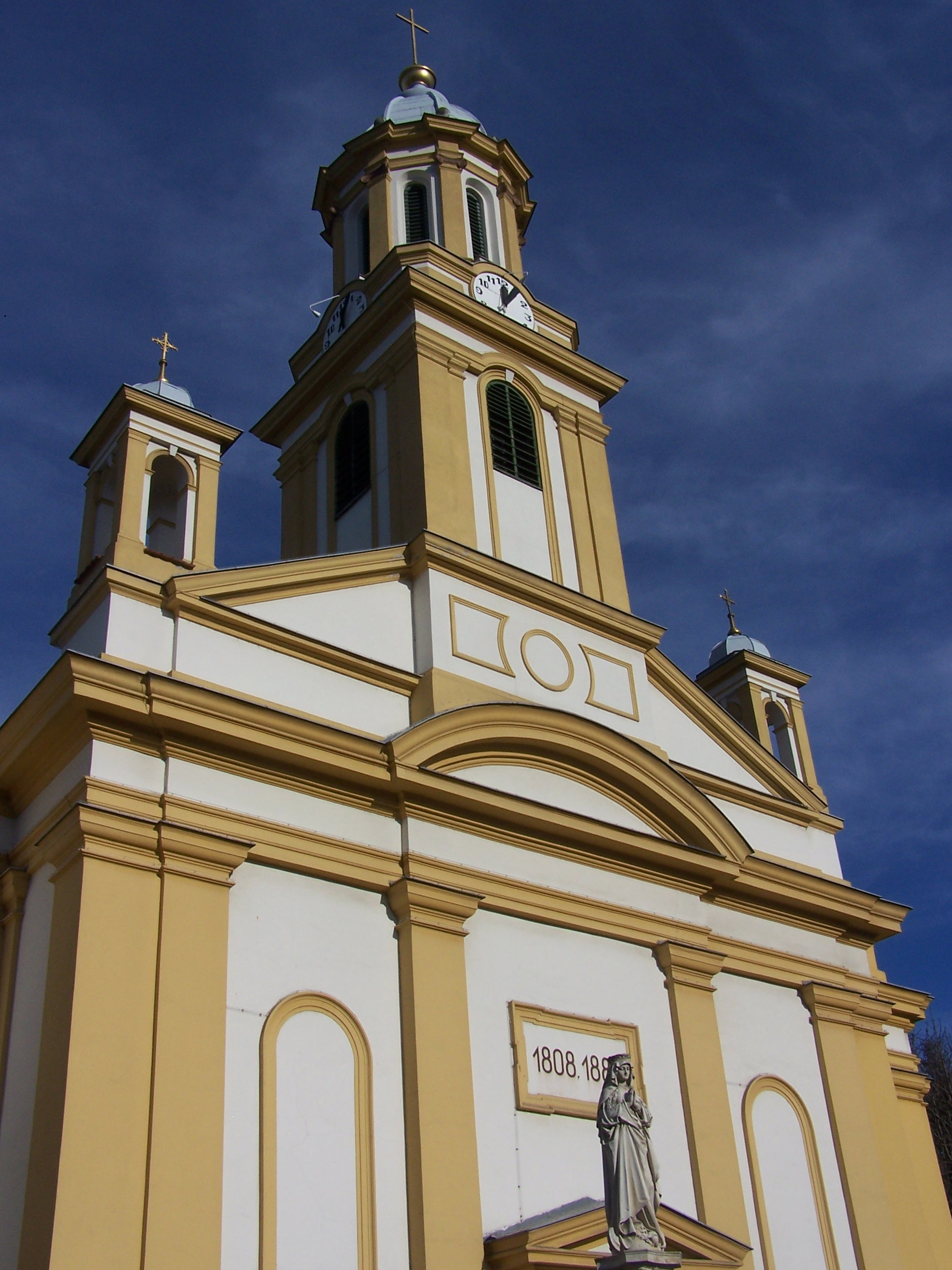 Szent Anna római katolikus templom (Kapuvár, Szabadság tér)